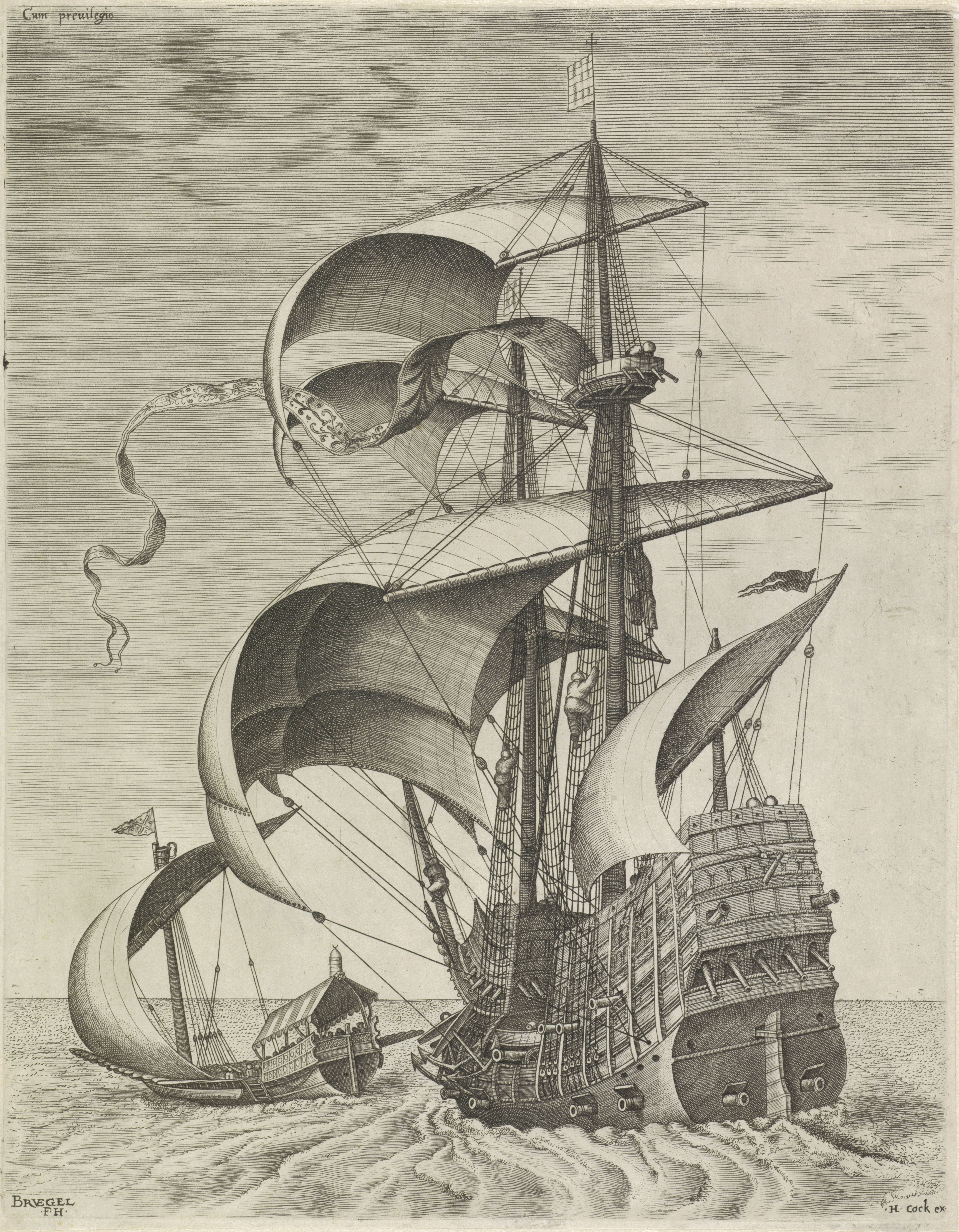 IdentificatieTitel(s): Een oorlogsschip begeleid door een galeiZeilschepen (serietitel)Objecttype: prent Objectnummer: RP-P-1882-A-6041Catalogusreferentie: New Hollstein Dutch 64-2(3)Opmerking: Pieter Bruegel the elderHollstein Dutch 16-26Opmerking: Frans HuysOpschriften / Merken: verzamelaarsmerk, verso, gestempeld: Lugt 2228verzamelaarsmerk, verso, gestempeld: Lugt 2064Omschrijving: Een oorlogschip met twee masten en volle zeilen, ter linkerzijde een galei.VervaardigingVervaardiger: prentmaker: Frans Huys (vermeld op object)naar ontwerp van: Pieter Bruegel (I) (vermeld op object)uitgever: Hieronymus Cock (vermeld op object)Plaats vervaardiging: AntwerpenDatering: 1561 - 1565Fysieke kenmerken: gravure en etsMateriaal: papier Techniek: graveren (drukprocedé) / etsenAfmetingen: plaatrand: h 316 mm × b 247 mmOnderwerpWat: ships (in general)Wanneer: 1540 - 1560Verwerving en rechtenVerwerving: aankoop 1882Copyright: Publiek domein